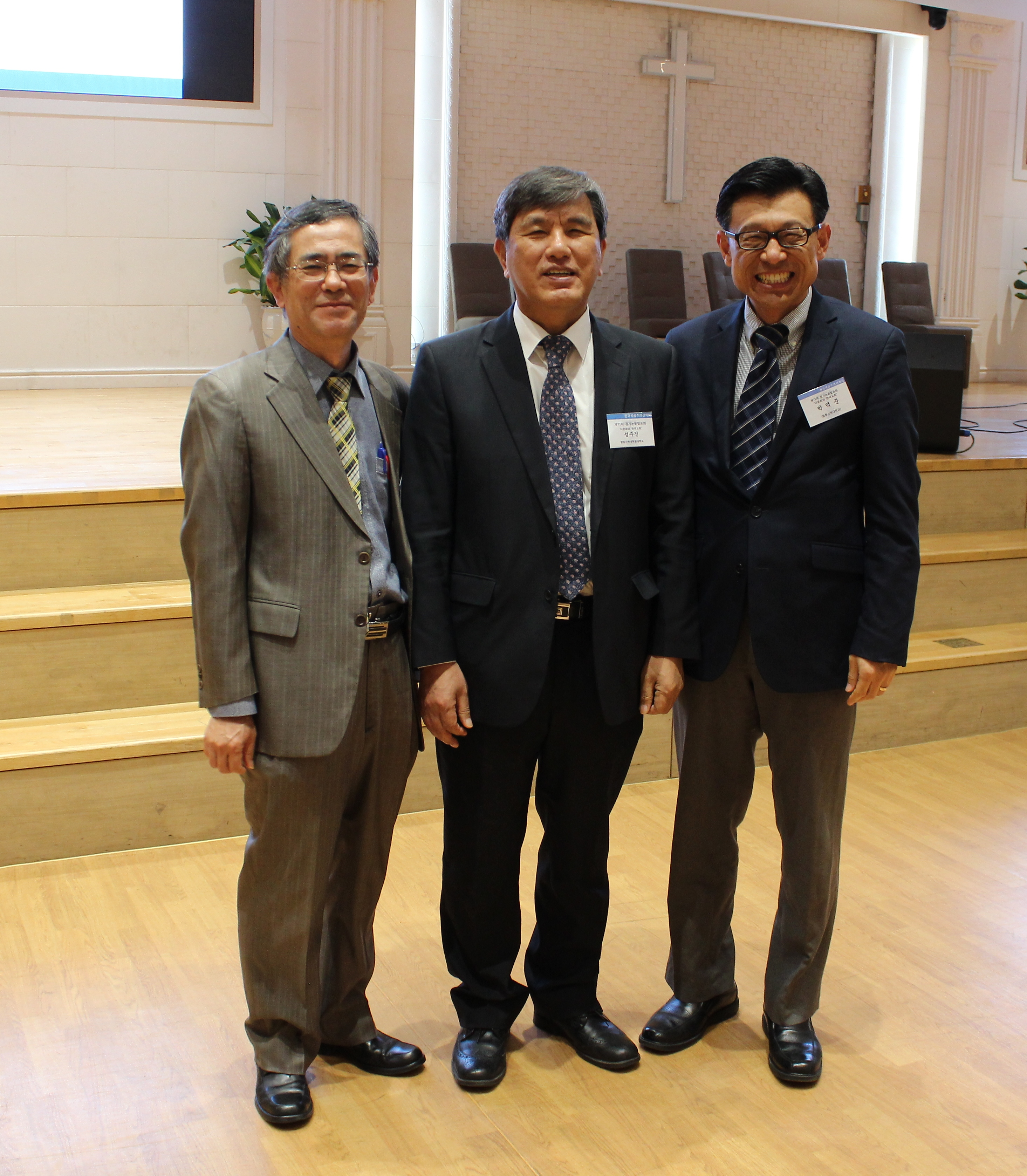 합동신학대학원 대학교 구약신학 교수들, 한국복음주의신학회, 2018-4